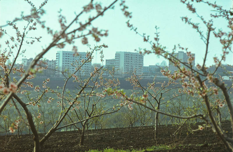 Codru town.